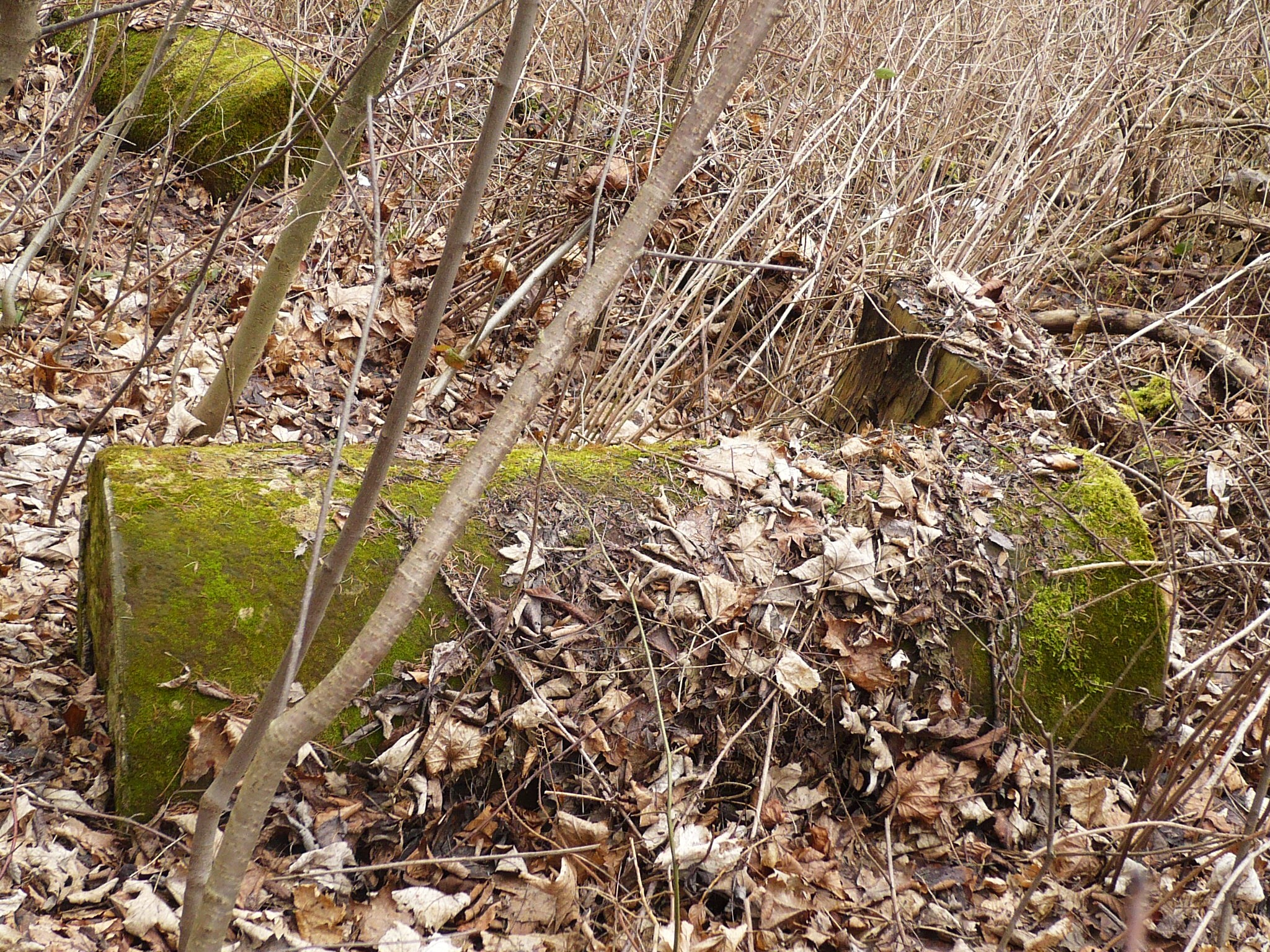 Kolumny z wieży na Górze Anny w Nowej Rudzie, leżące na stoku poniżej